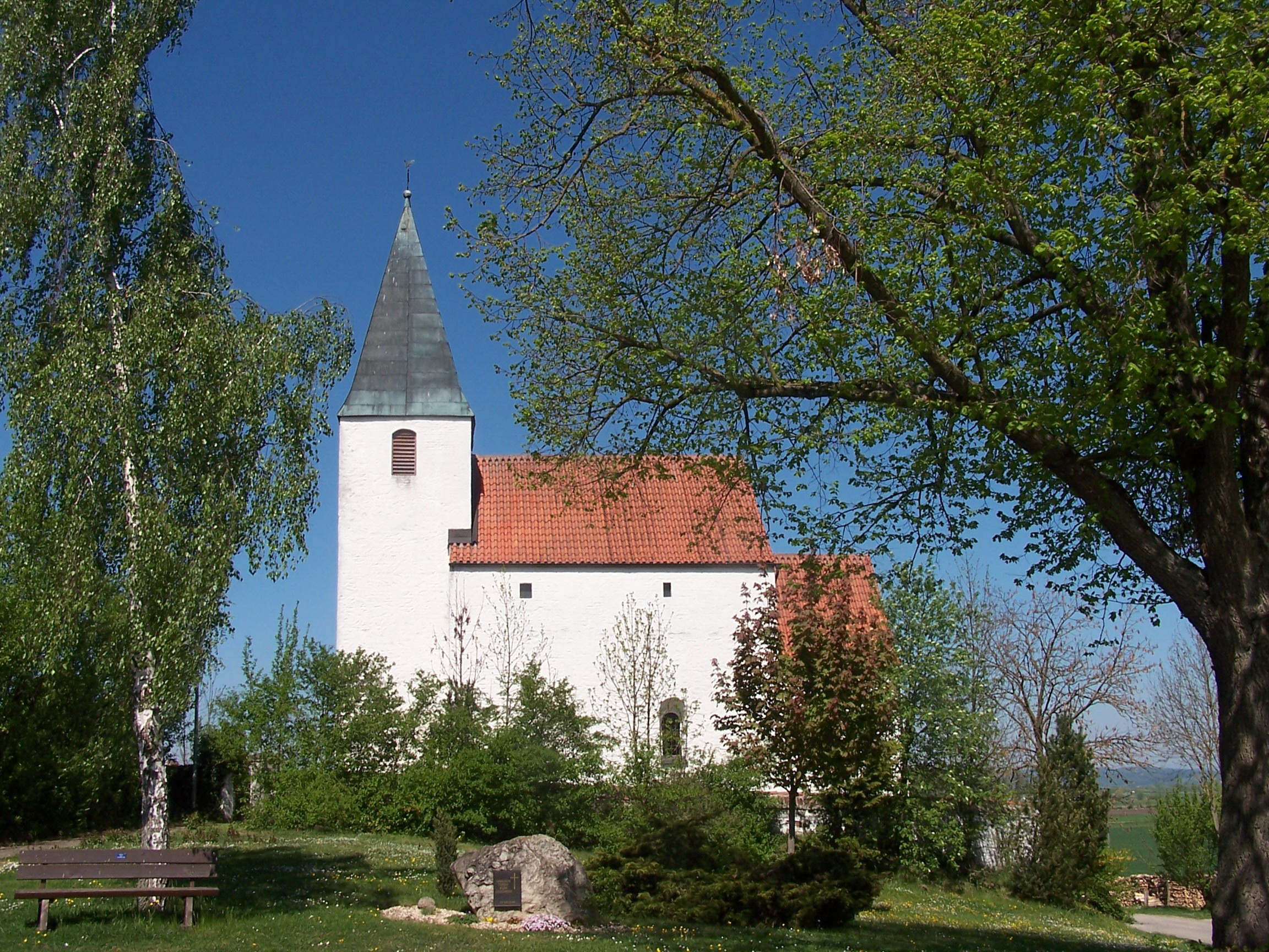 Atting, Ringstraße 16. Romanische doppelgeschossige Wehrkirche. 13. Jahrhundert; mit Ausstattung. Kirchhofsmauer, 16./17. Jahrhundert.